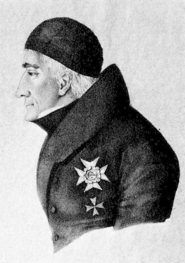 Gustaf Lagerbielke (1777-1837)